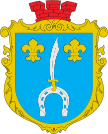 Герб с. Козин (Радивилівський район)